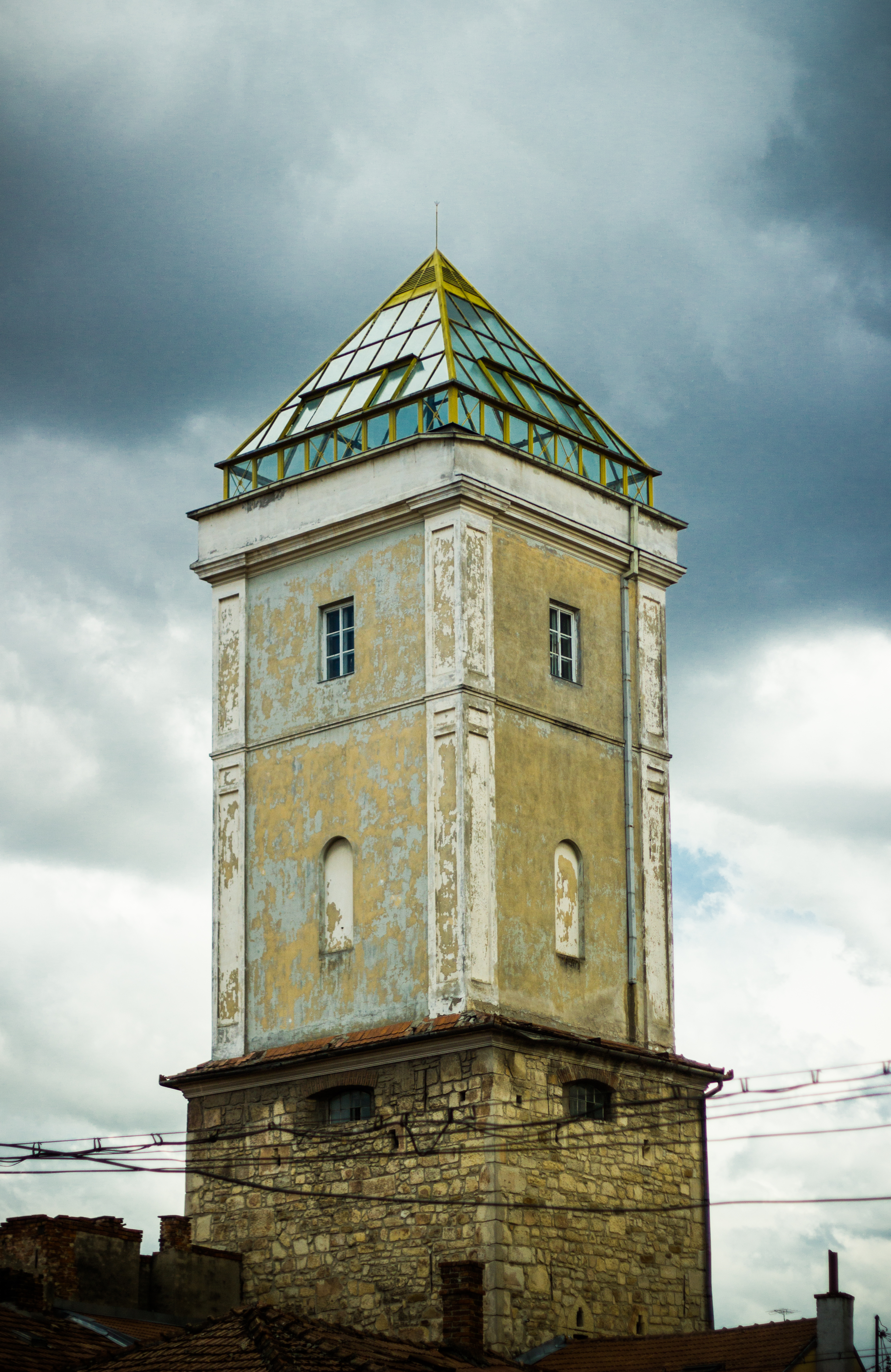 anul 1405, partea superioară sec. XIX, Str. Tipografiei 17, 03